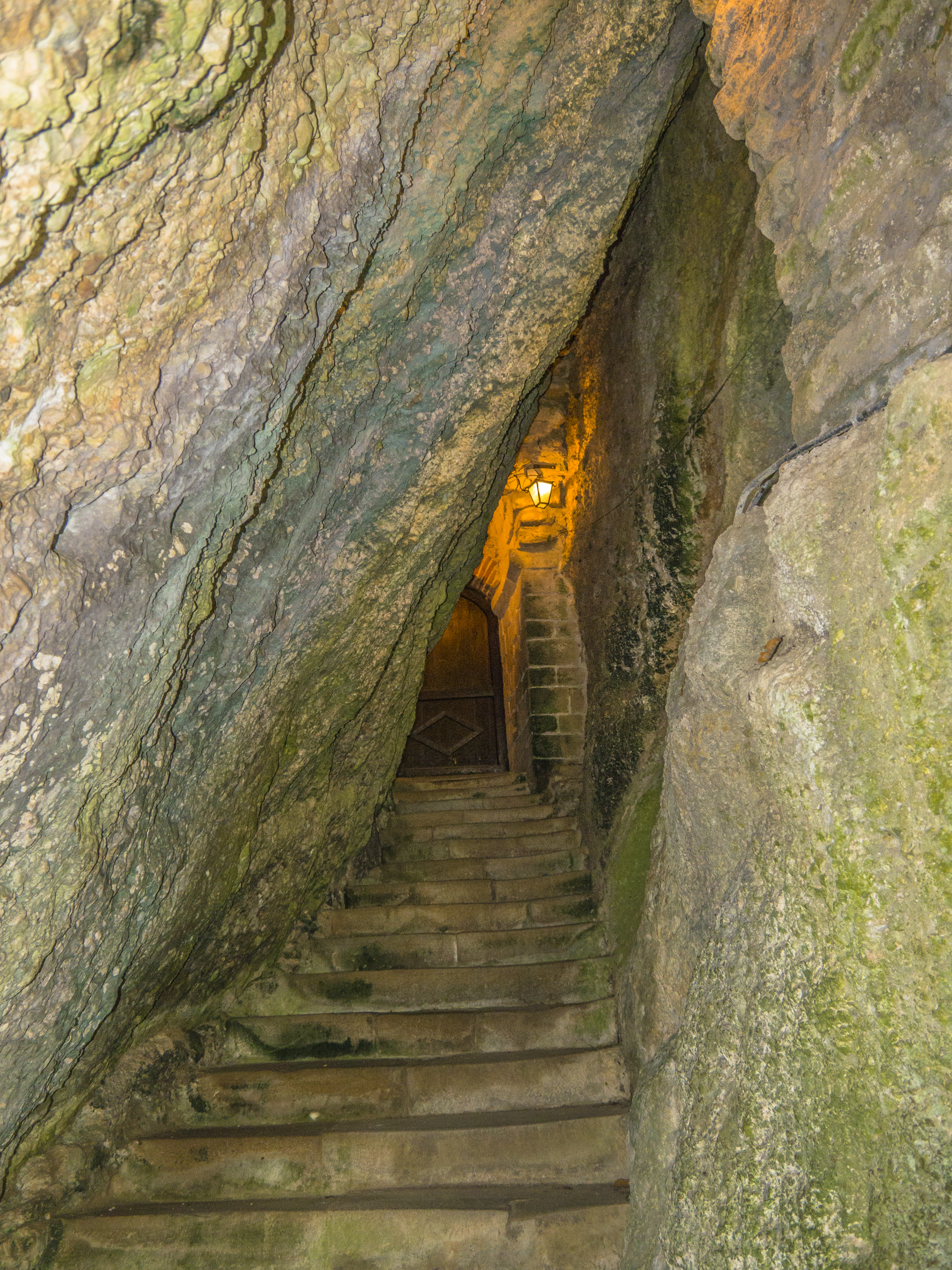 L'entrée se situe après un passage étroit entre deux rochers. .